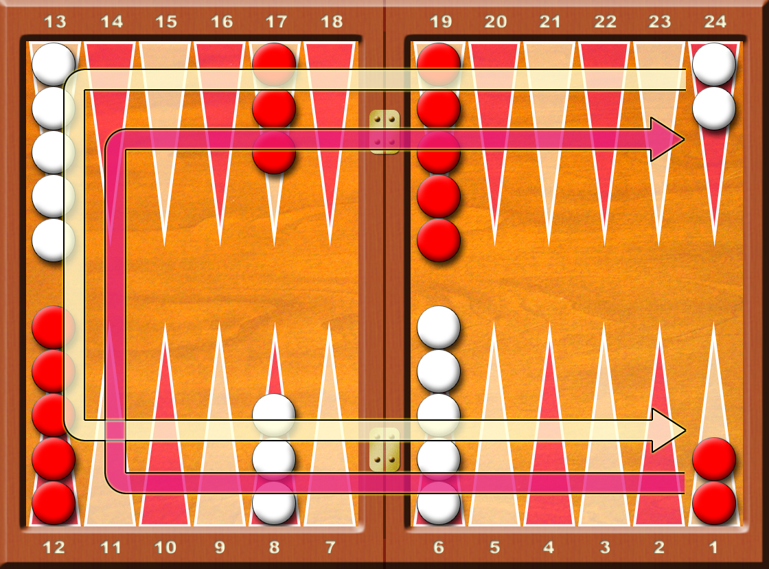 Backgammon--Direzioni di movimento delle pedine Francesco De Lorenzo (fr.dl CHIOCCIOLA tiscali.it) è l'autore di questa immagine e l'ha rilasciata sotto licenza GFDL